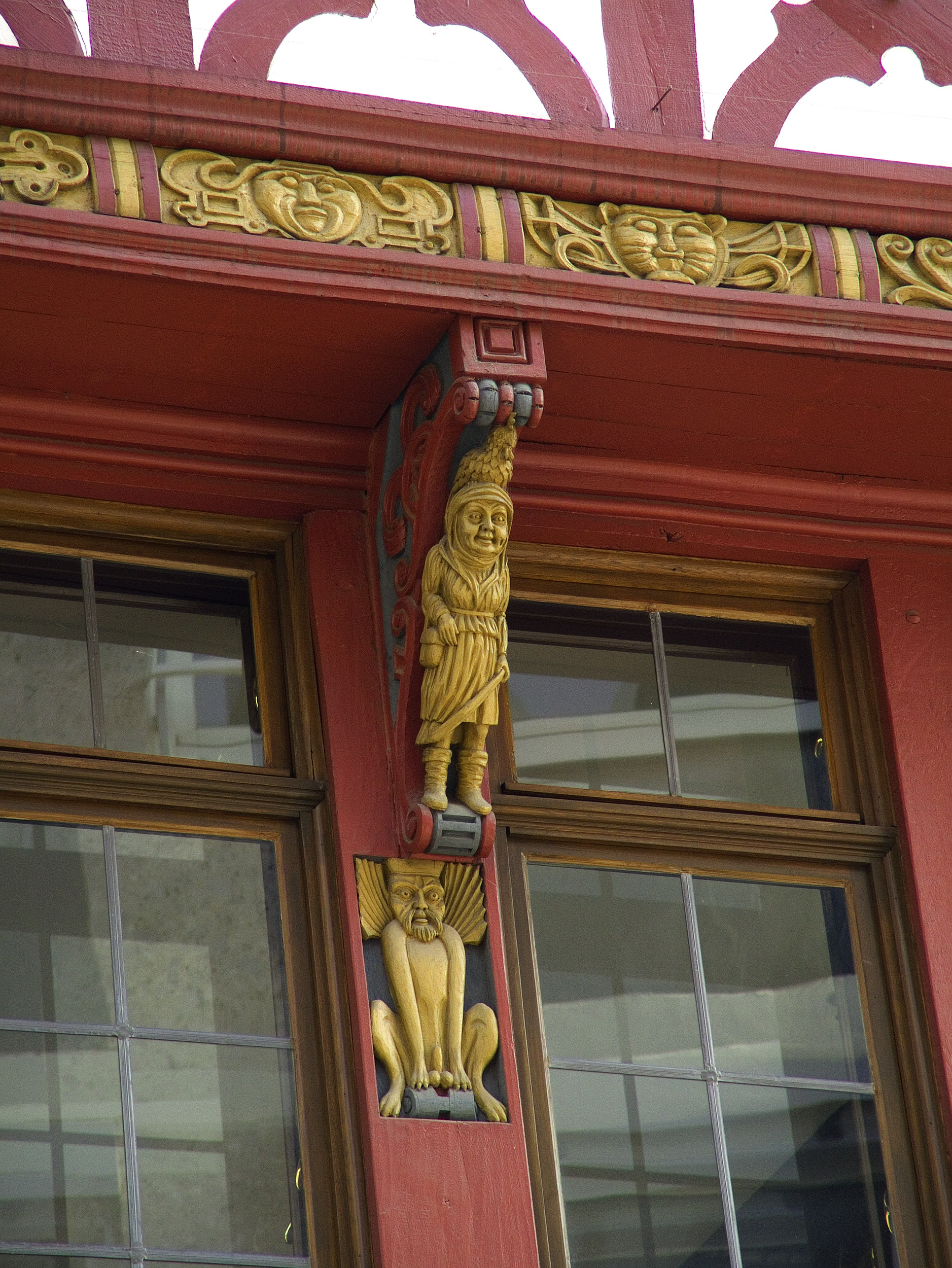 Westliche Knagge unter dem zweiten Obergeschoss der zum Markt gewandten Seite des Großen Engels in der Altstadt von Frankfurt am Main. Selber fotografiert im Mai 2006, daher gemeinfrei.